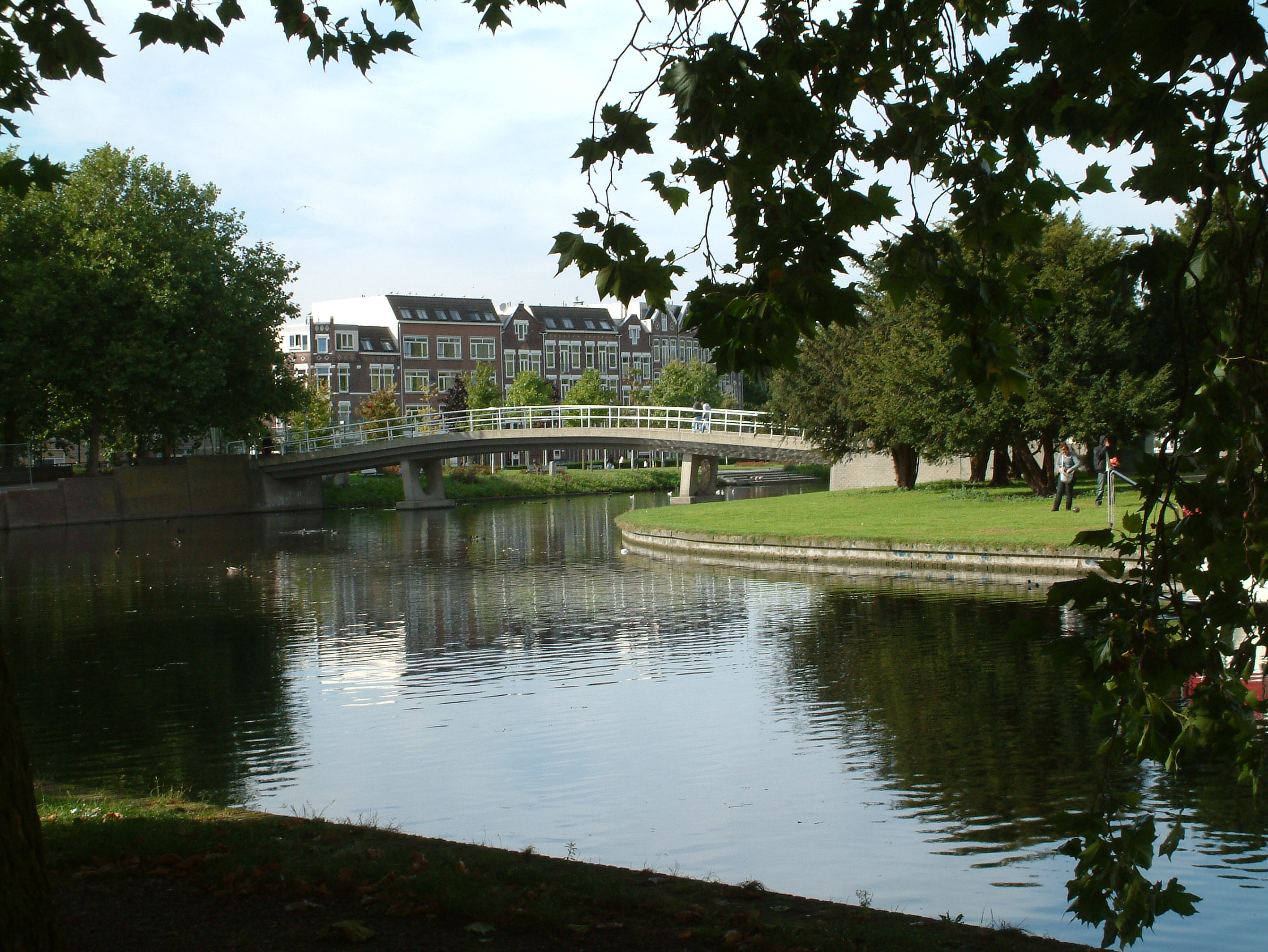 De Zwaanshalsbrug over de Rotte in Rotterdam